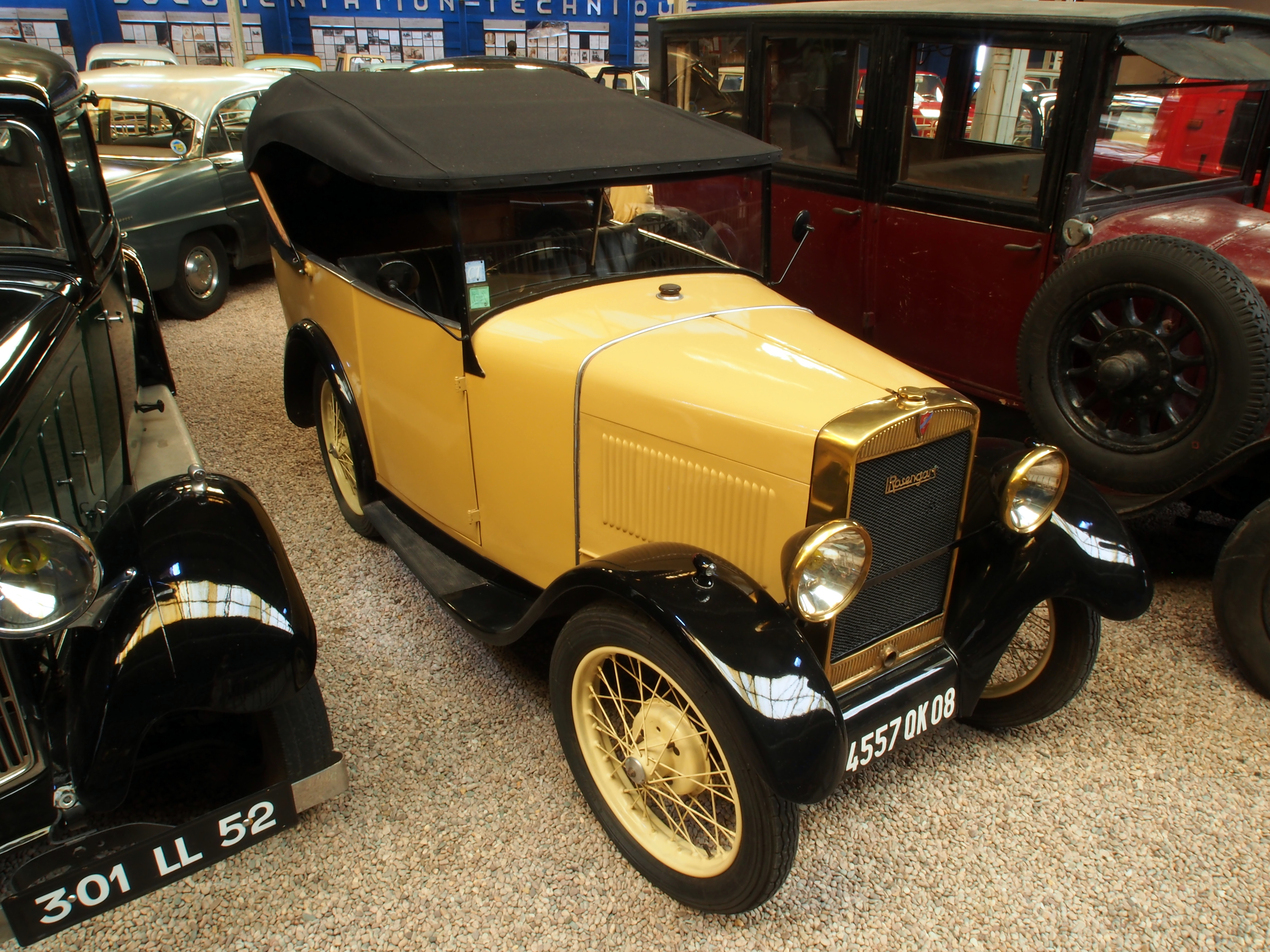 1929 Rosengart LR2